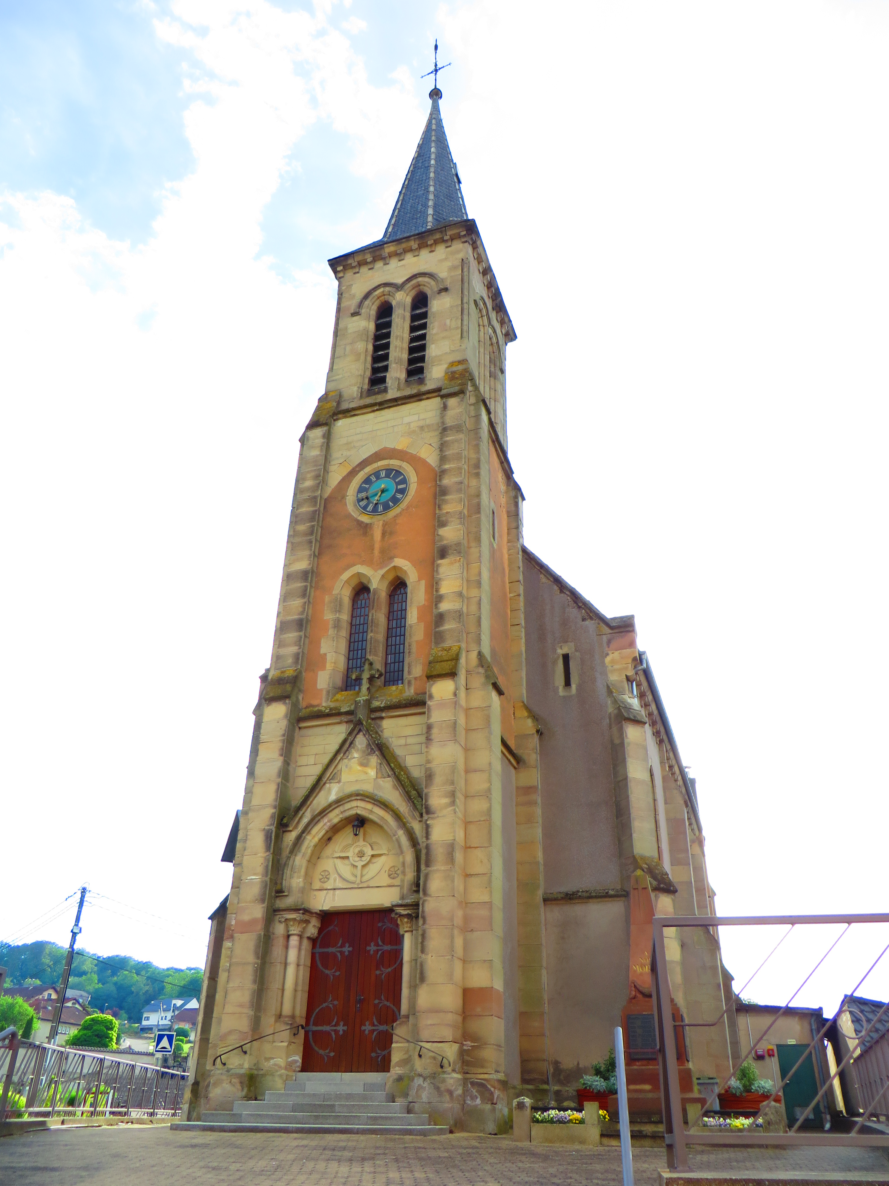 Blies-Ébersing Église Saint-Hubert